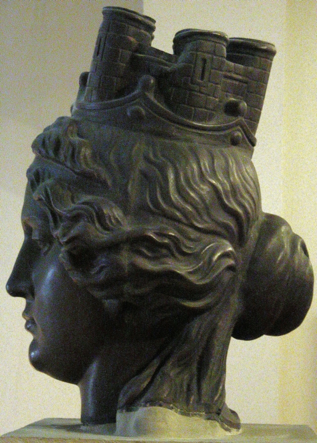 Braunschweig